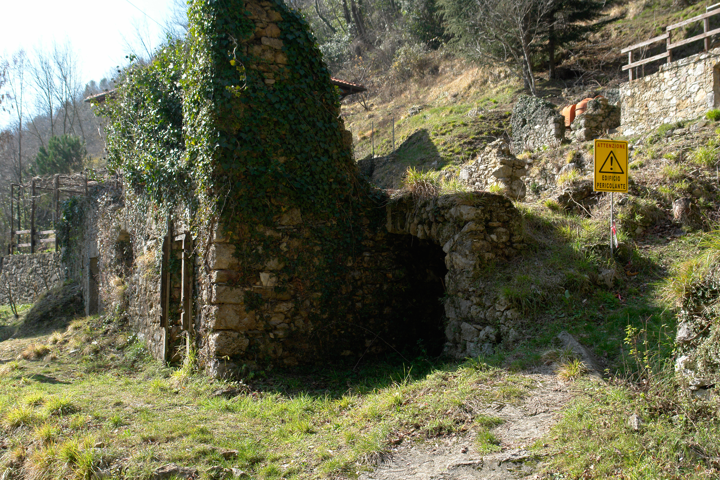 Sant' Anna di Stazzema, letzte erhaltene Ruine